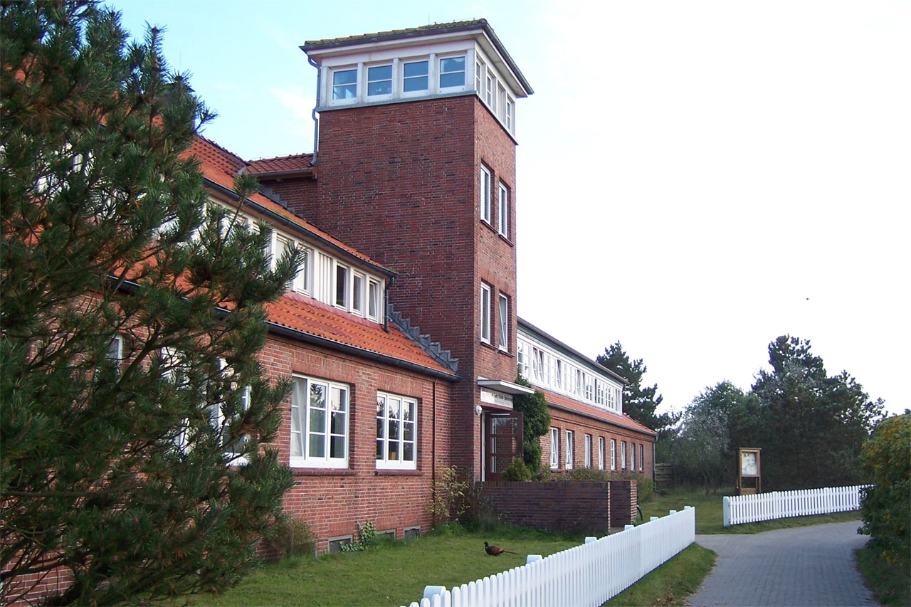 Nordseeinsel Spiekeroog. Hermann-Lietz-Schule (Internatsgymnasium in freier Trägerschaft)